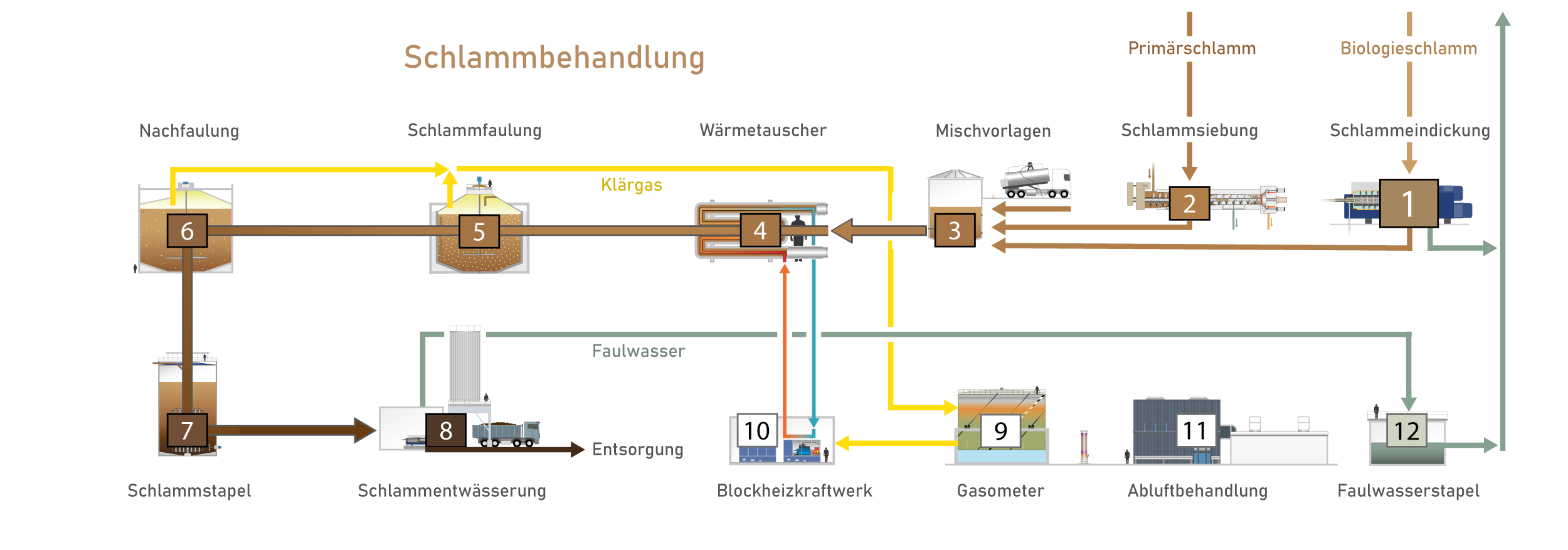 Fliessschema der Schlammbehandlung in der ARA Worblental in Worblaufen